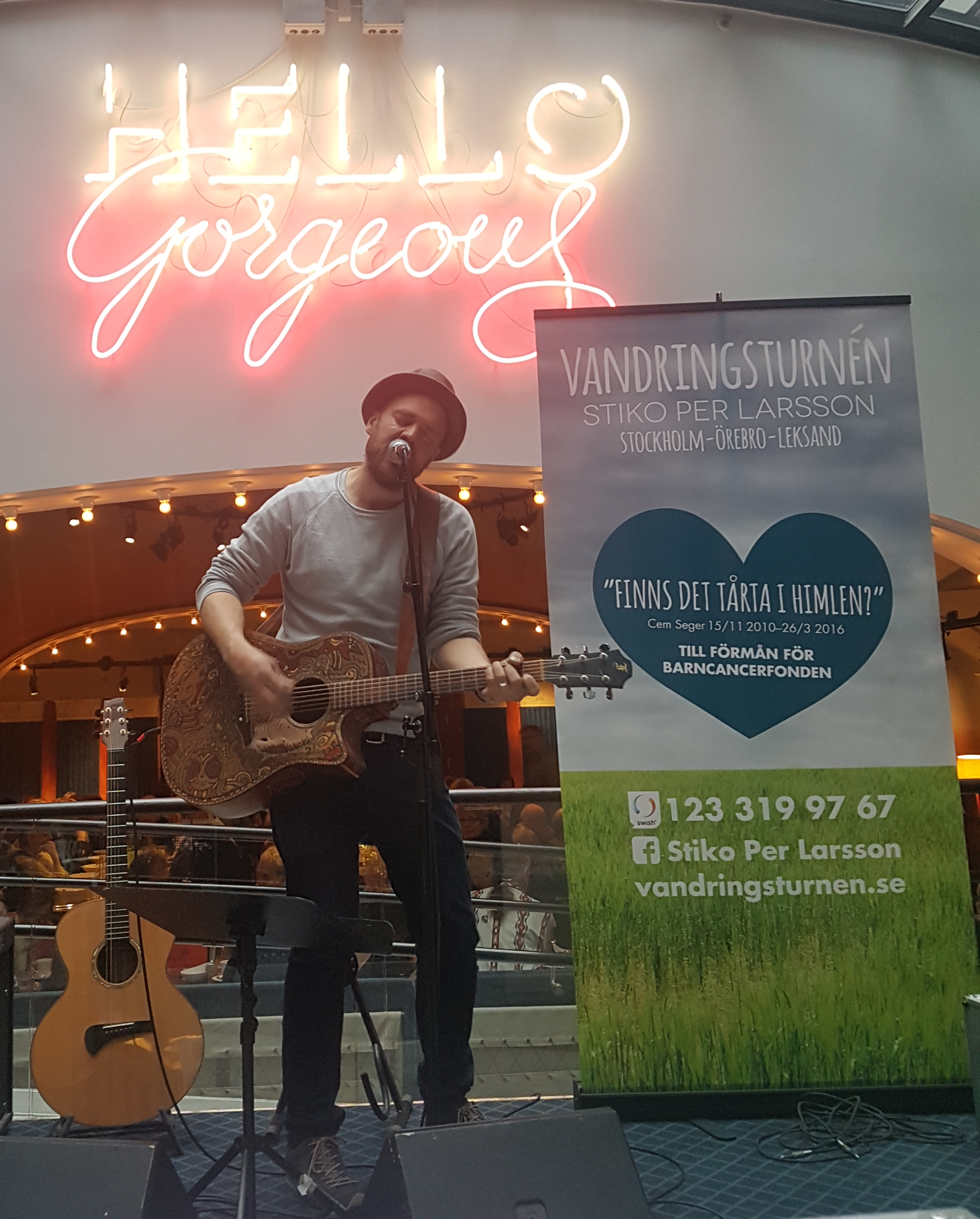 Stiko Per Larsson under första spelningen på Vandringsturnén 2017. Spelningen var på Grand Central by Scandic i Stockholm, och vandringsturnén genomfördes till förmån för Barncancerfonden.